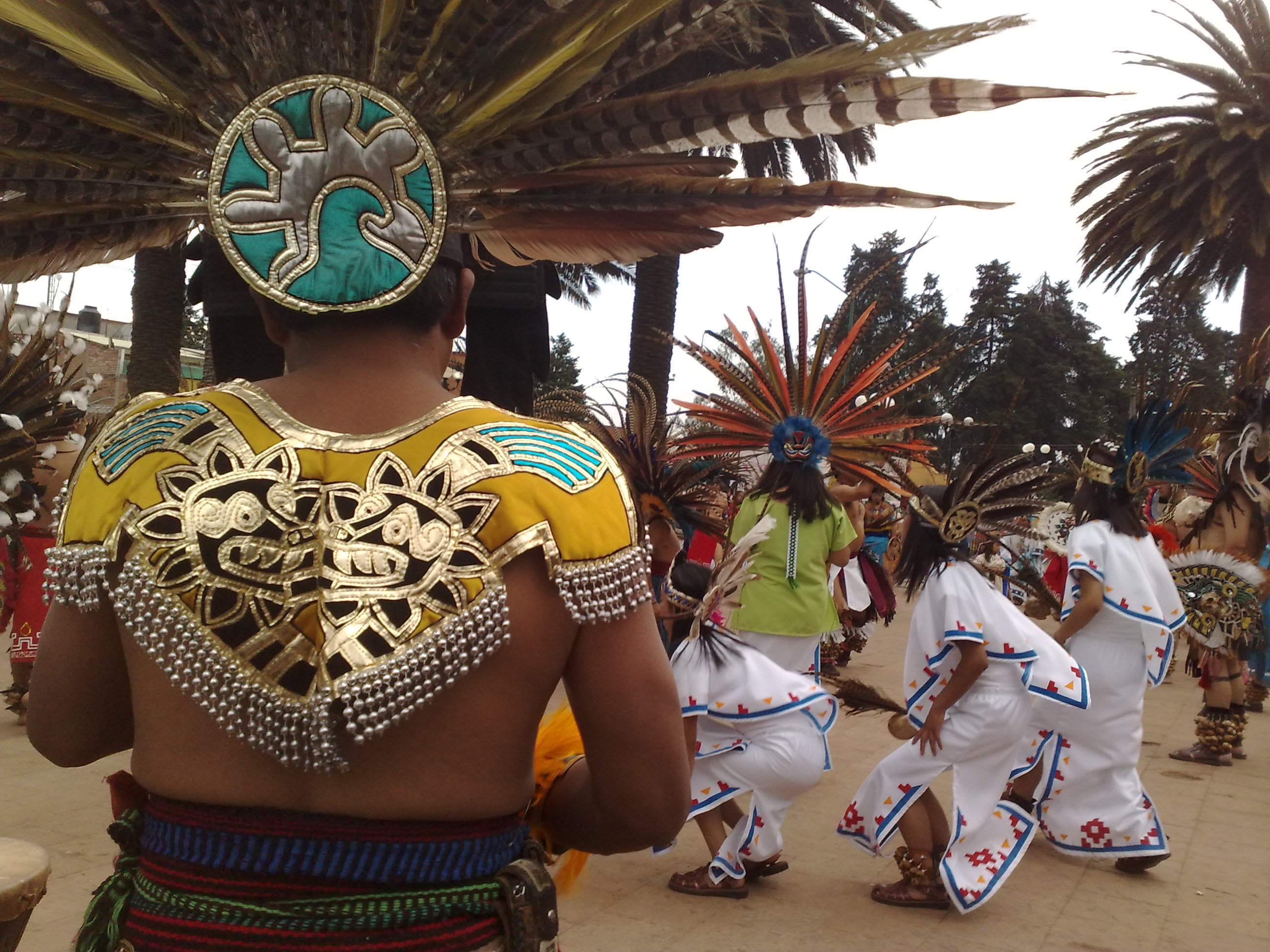 Ceremonia Azteca del Fuego Nuevo en Metepec